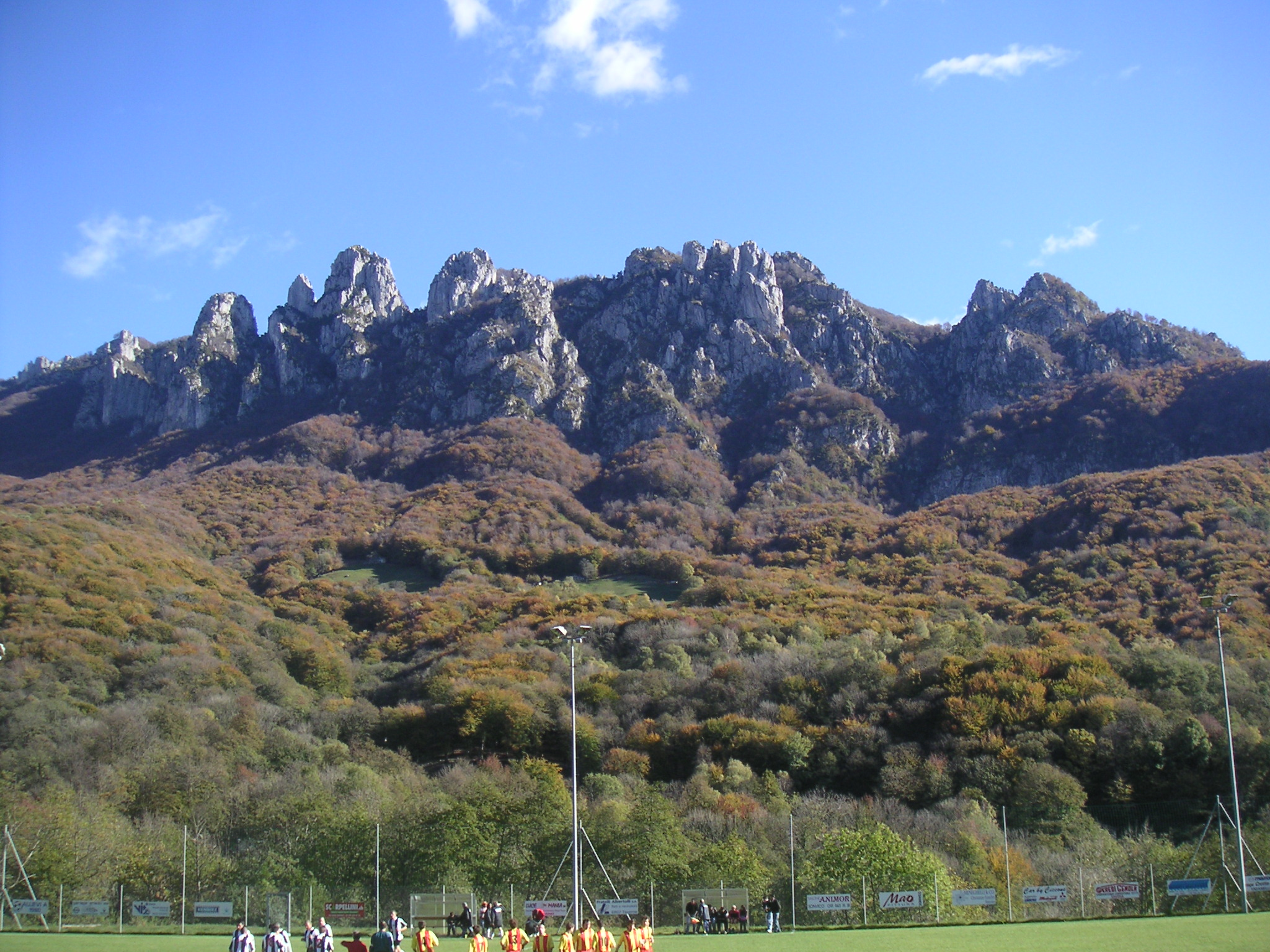 Veduta dei Denti della Vecchia da Sonvico. È ben visibile il Sasso Grande.